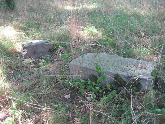 Pozostałości nagrobka na cmentarzu żydowskim w Wiślicy